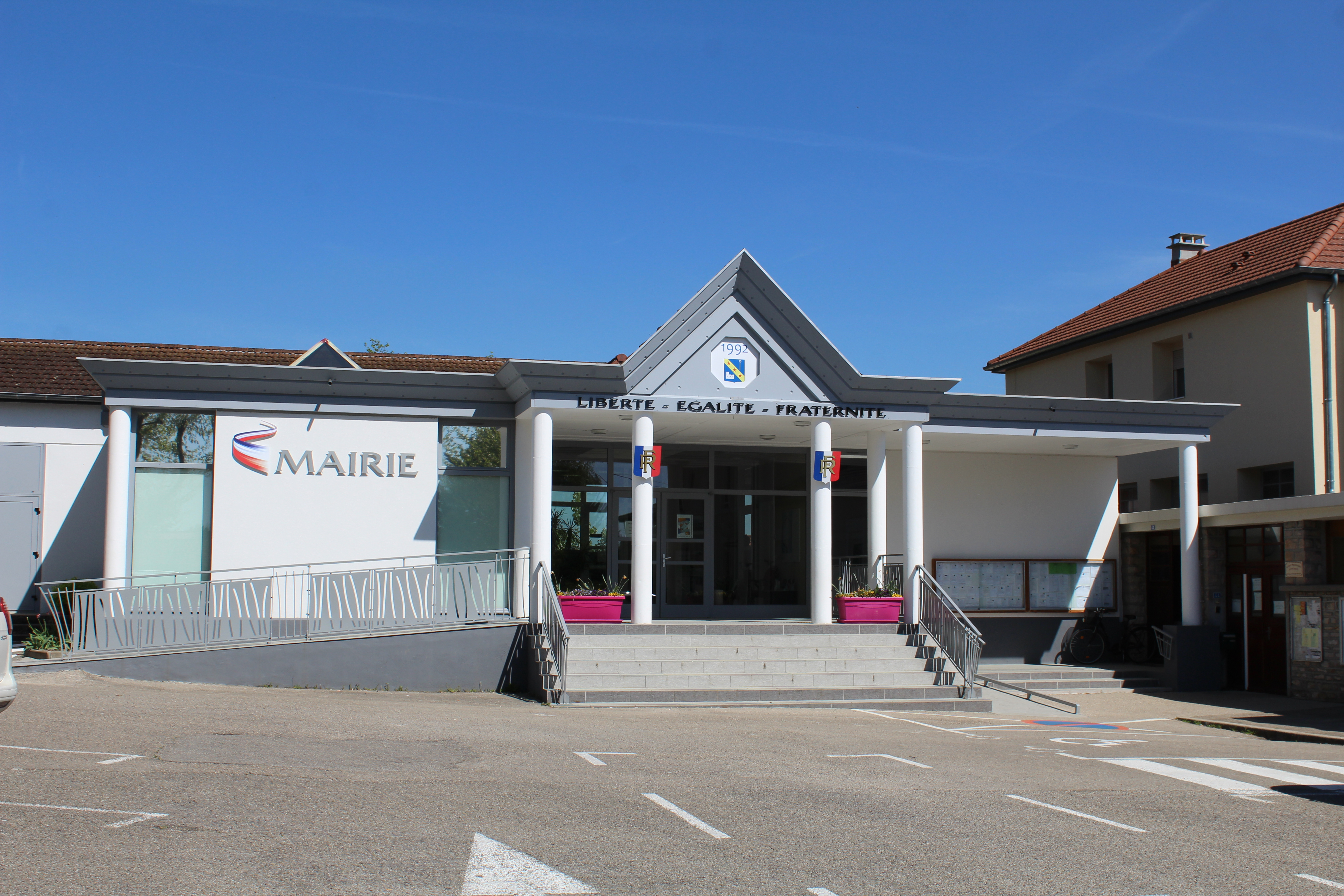 Mairie de Bourg-Saint-Christophe.